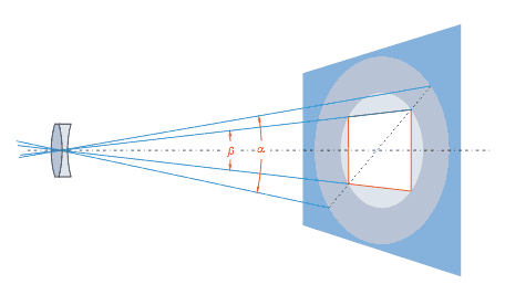 Object